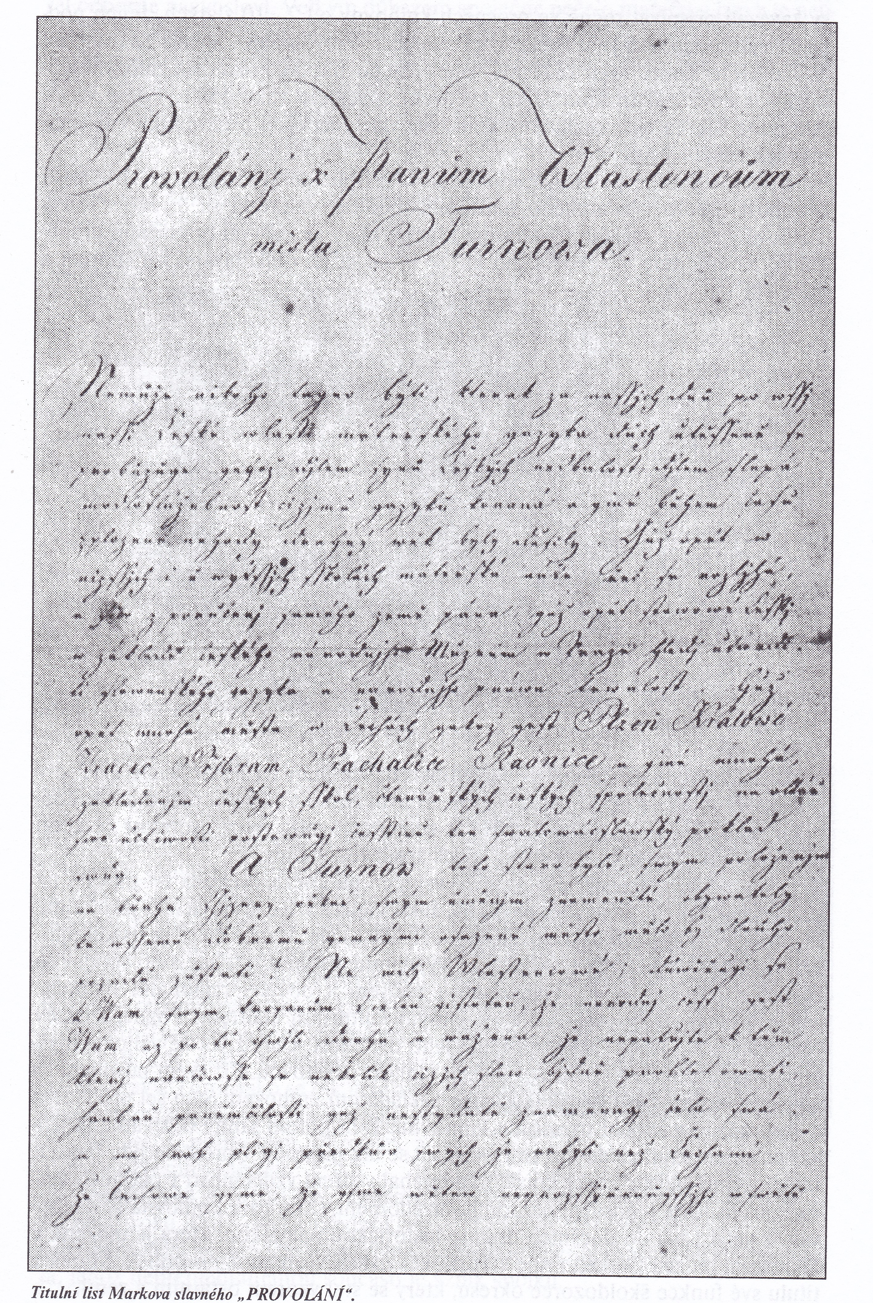 Provolání k založení knihovny